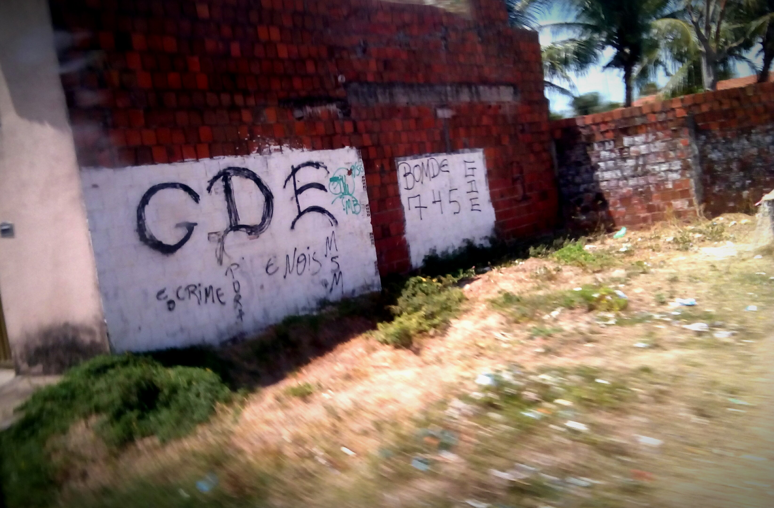 GDE (Guardiões do Estado) é uma Facção criminosa cearense. Local da Foto: Maracanaú Fotógrafo: Cícero Rubens